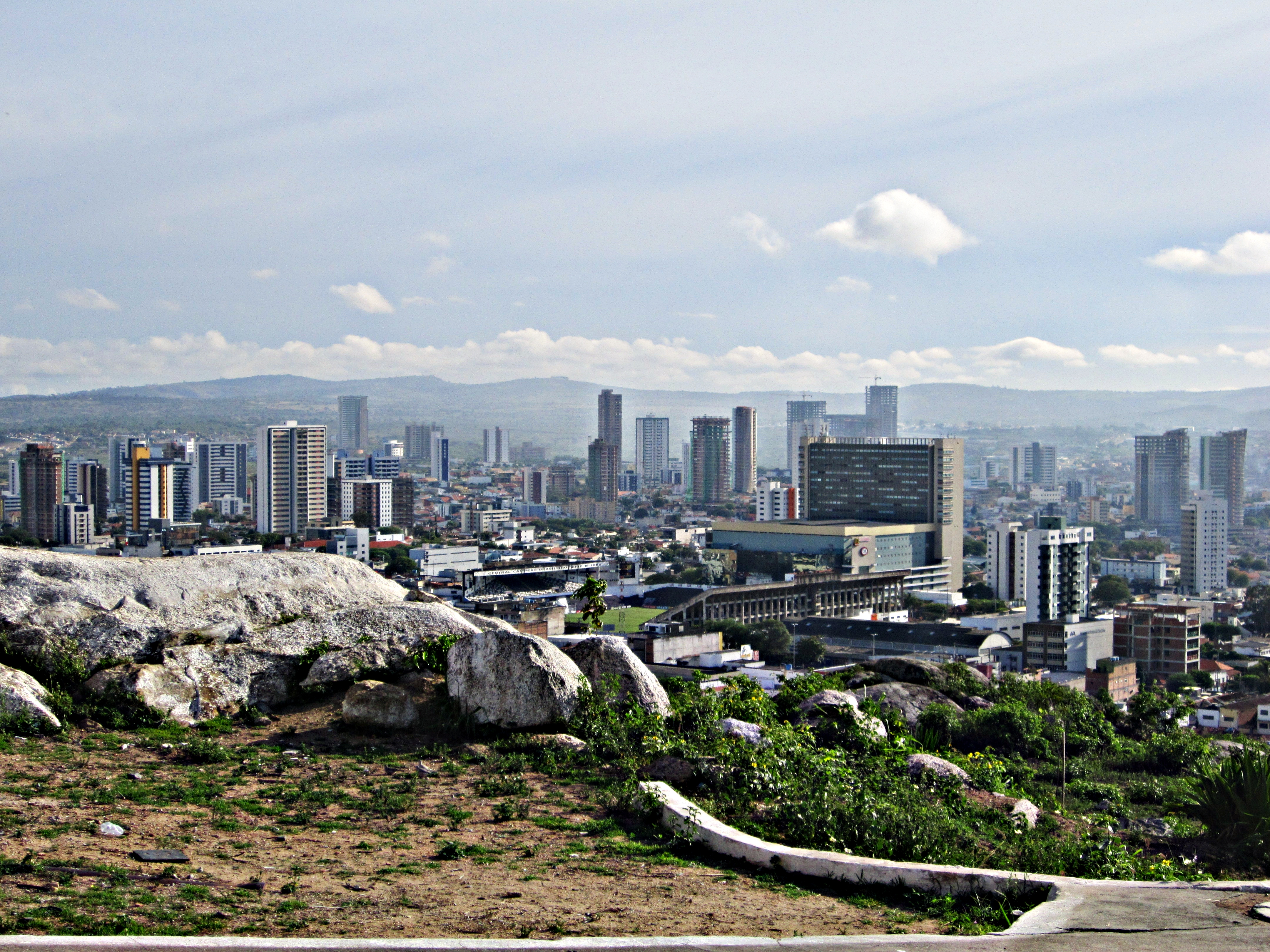 Vista do Monte do Bom Jesus - Caruaru - Pernambuco - Brasil